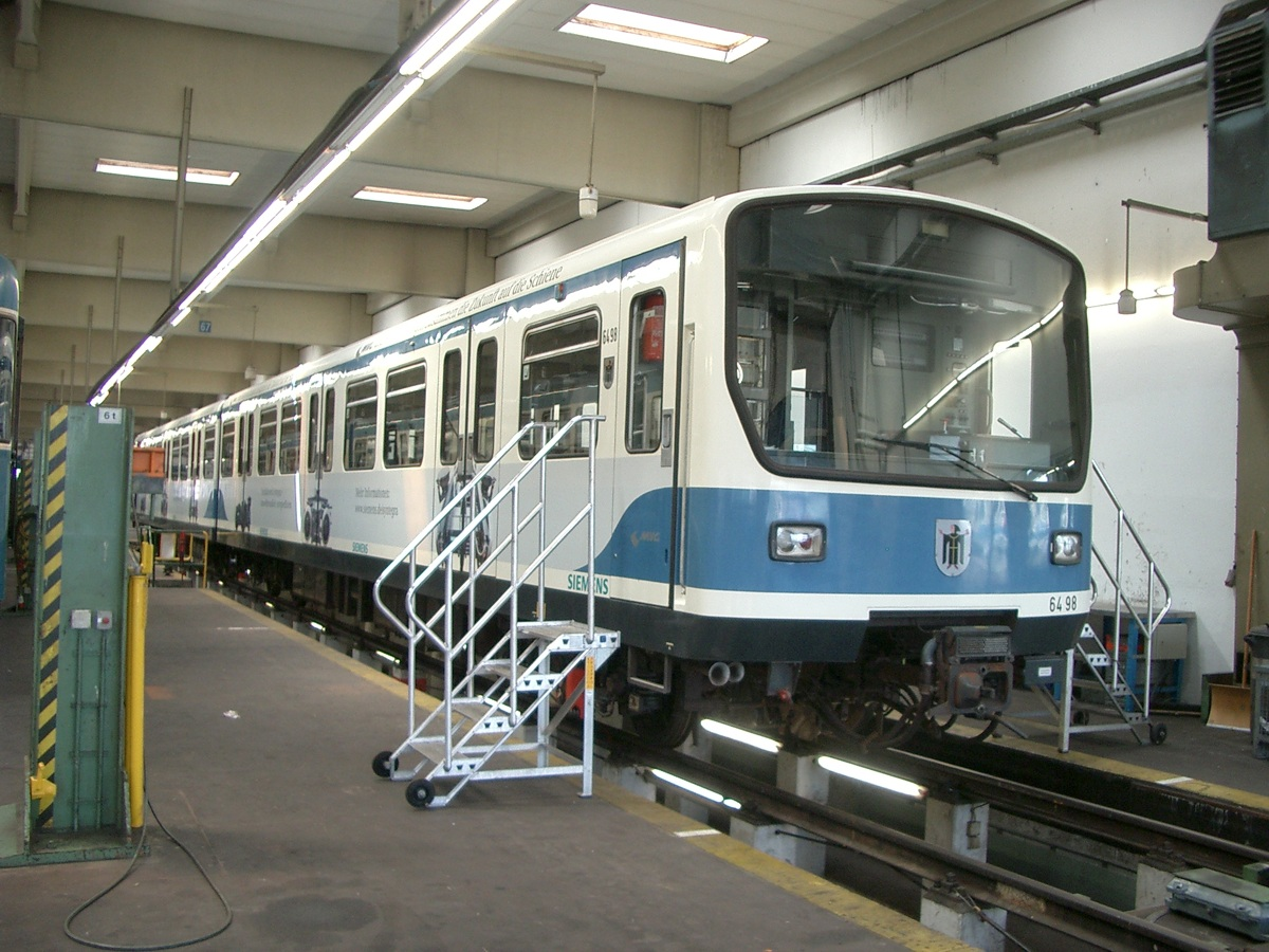 U-Bahn München Typ B Wagen 6498/7498 mit Siemens Syntegra Drehgestell